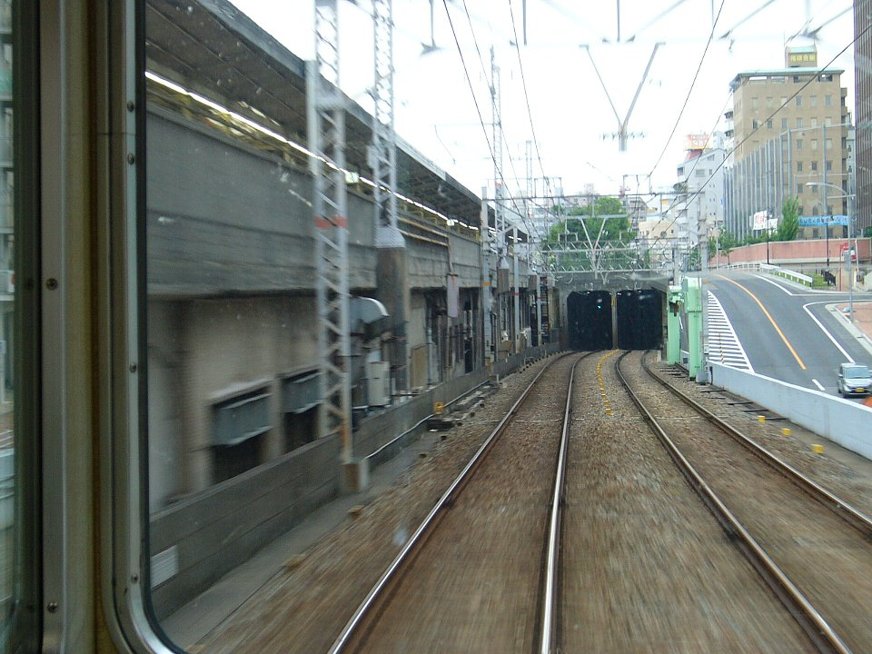 神戸高速鉄道唯一の地上区間から地下へ入る 阪急三宮～花隈にて 左の高架はJR元町駅 阪急車内から撮影 2006年6月 Bakkai撮影